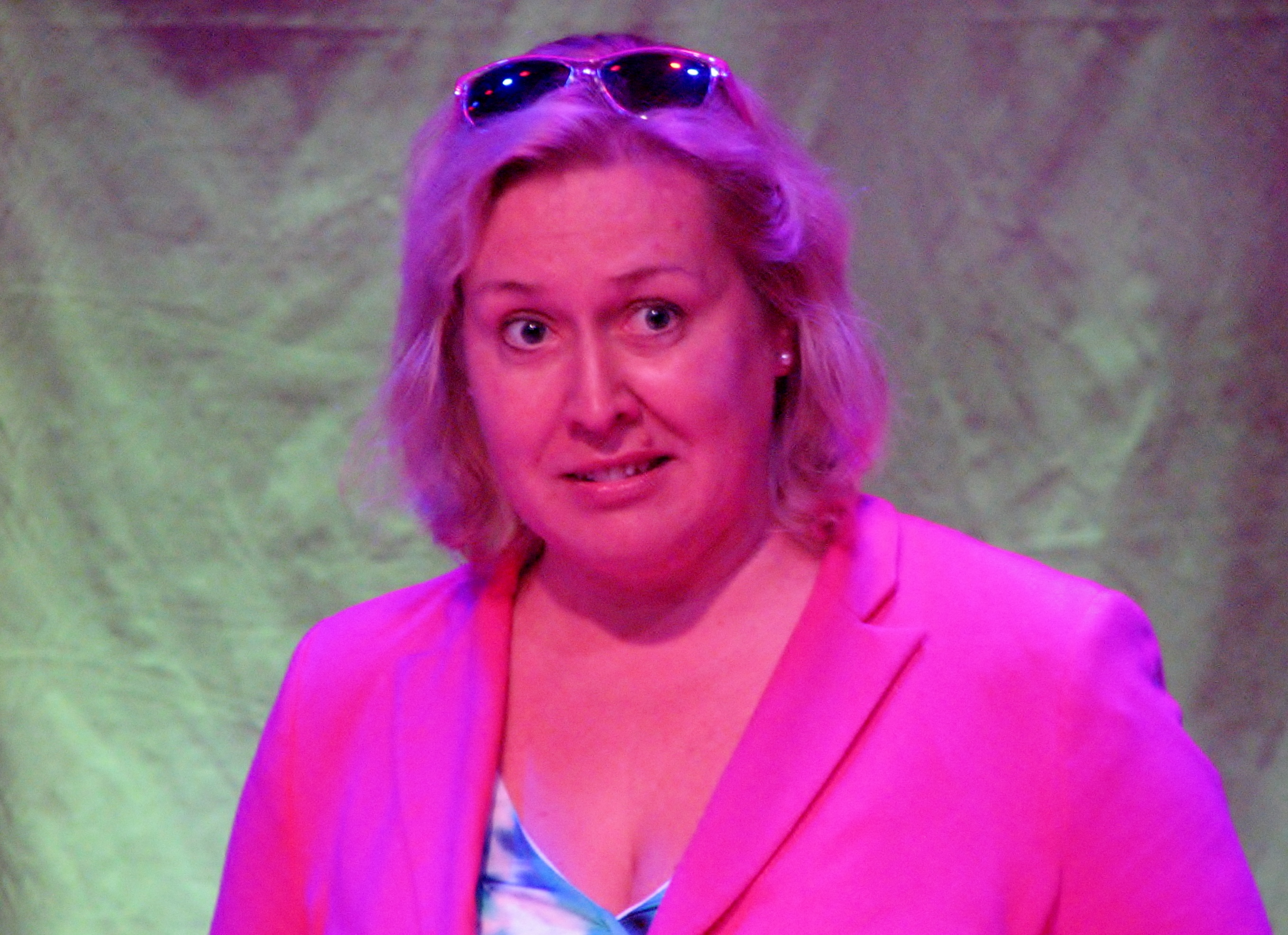 Triin Ella esinemas Estonia 100 ürituse raames ooperijuttude toas